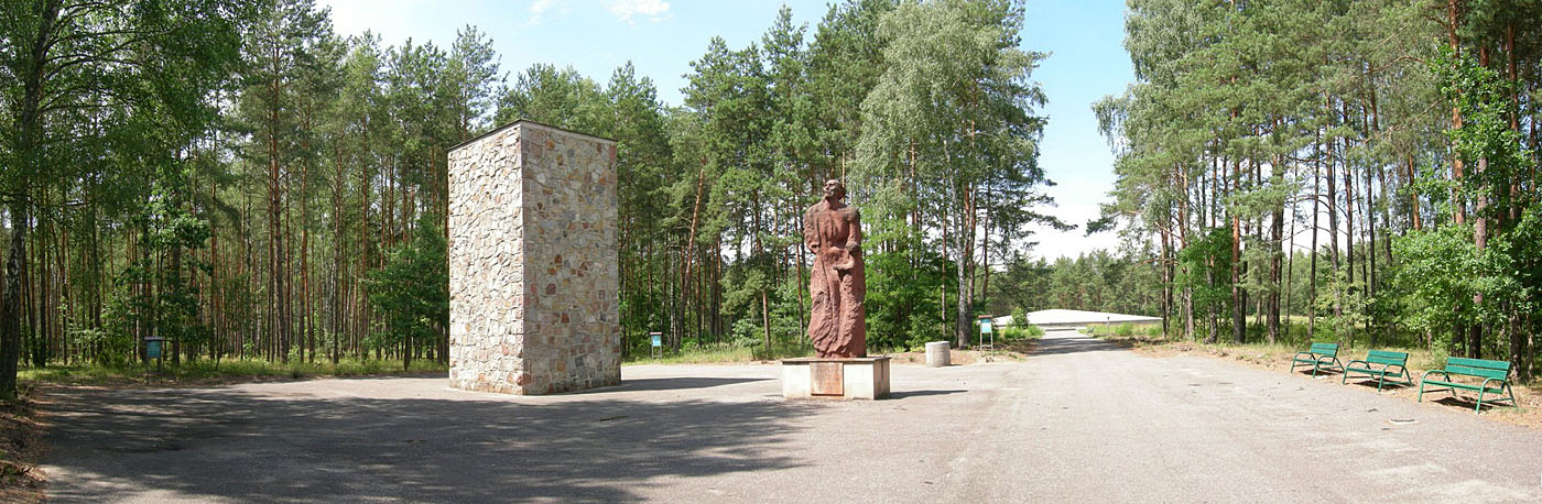 Sobibór - Mémorial sur le site du camp.